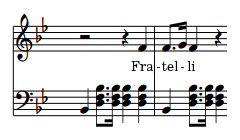 Incipit della prima strofa dell'Inno di Mameli (testo di Goffredo Mameli, musica di Michele Novaro) Partitura creata con MuseScore This PNG graphic was created with GIMP.